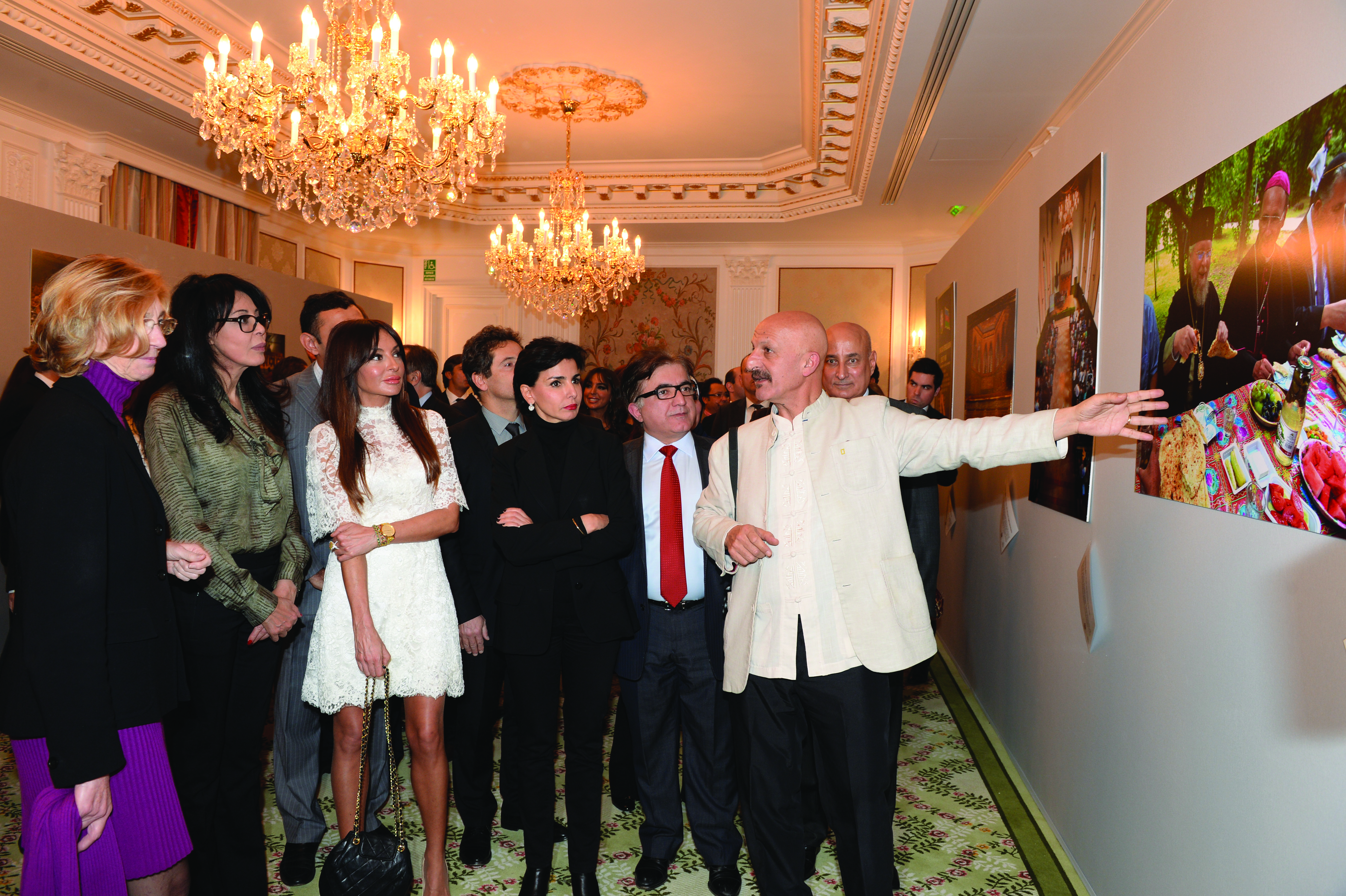 Parisdə “Azərbaycan – tolerantlıq məkanı” adlı foto-sərgi